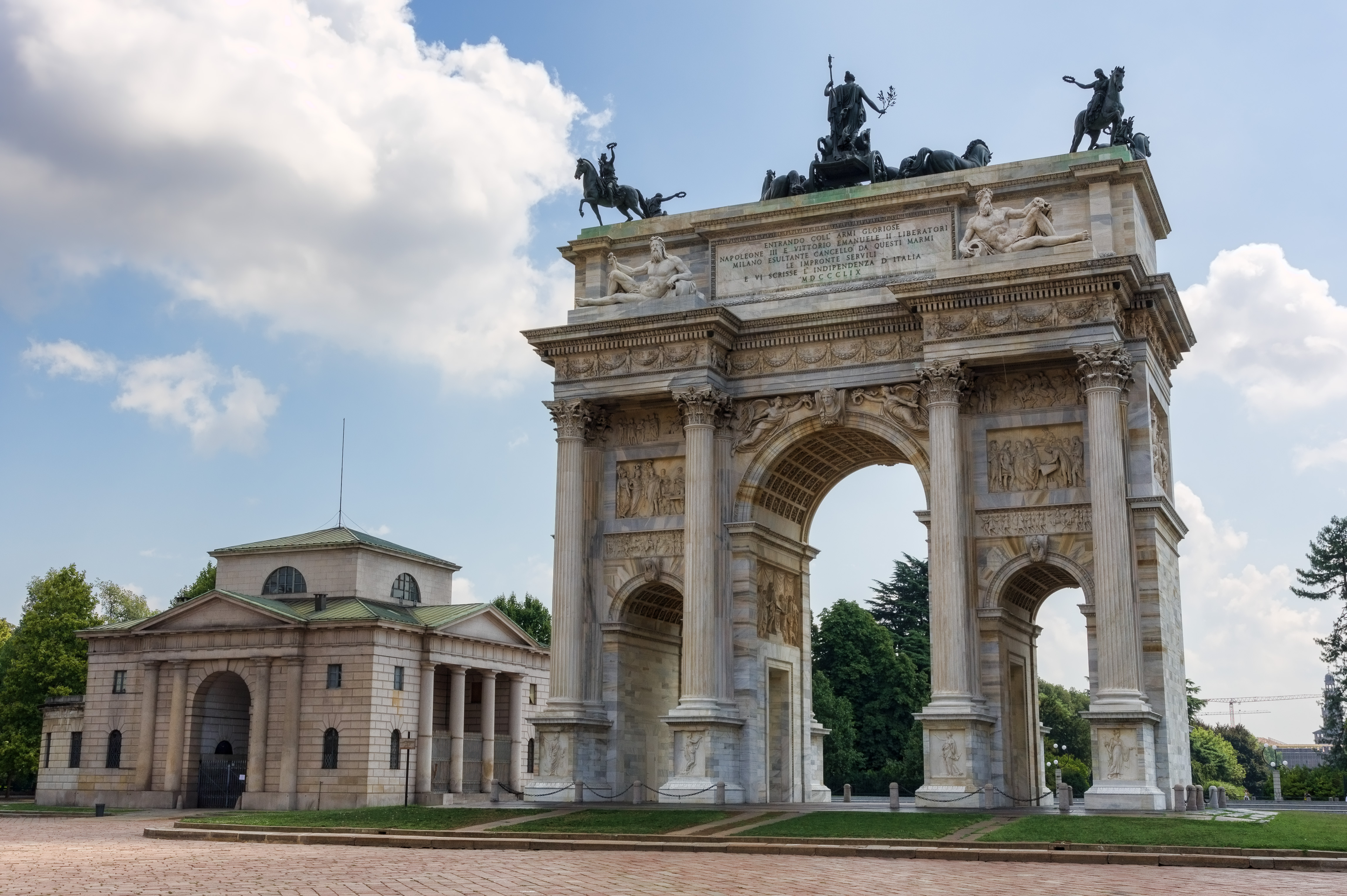 Arco della Pace - Milan - Italie